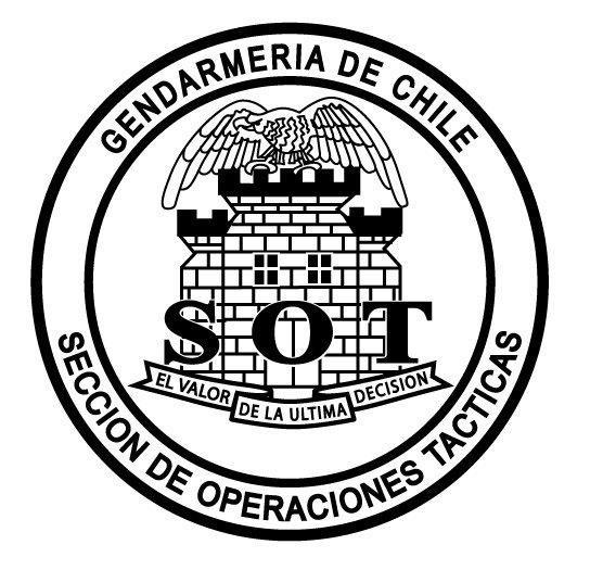 Escudo S.O.T.